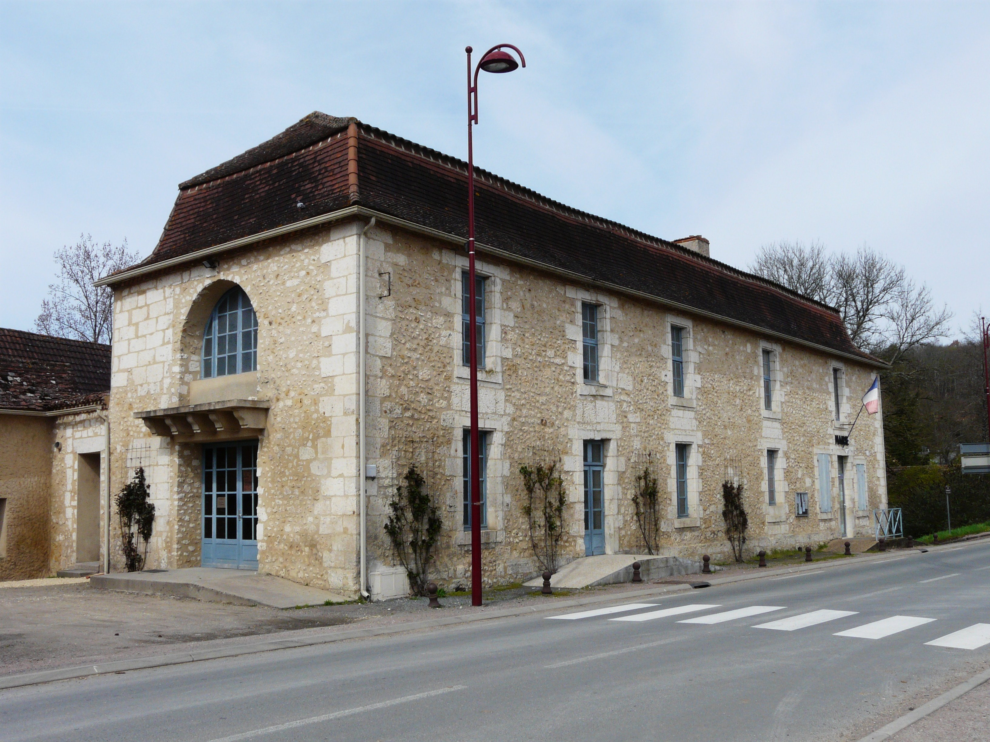 La mairie de Douville (à Pont-Saint-Mamet), Dordogne, France.